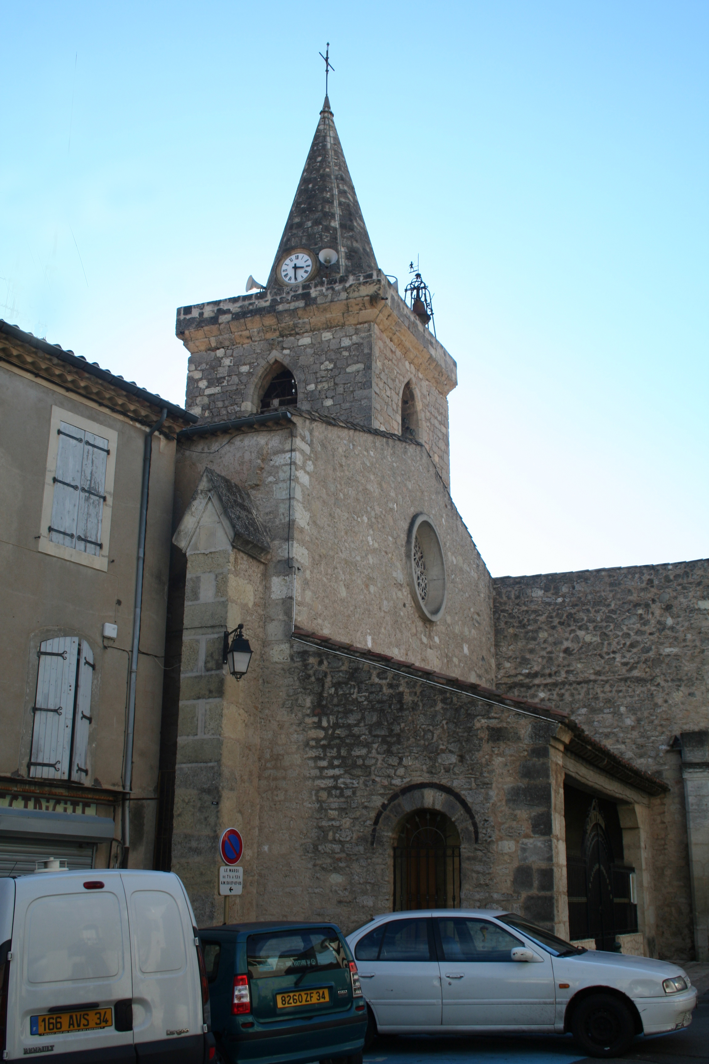 Puisserguier (Hérault) - église Saint-Paul.